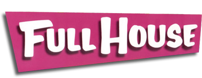 Logo carregado para ser inserido na página Full House na Wikipedia